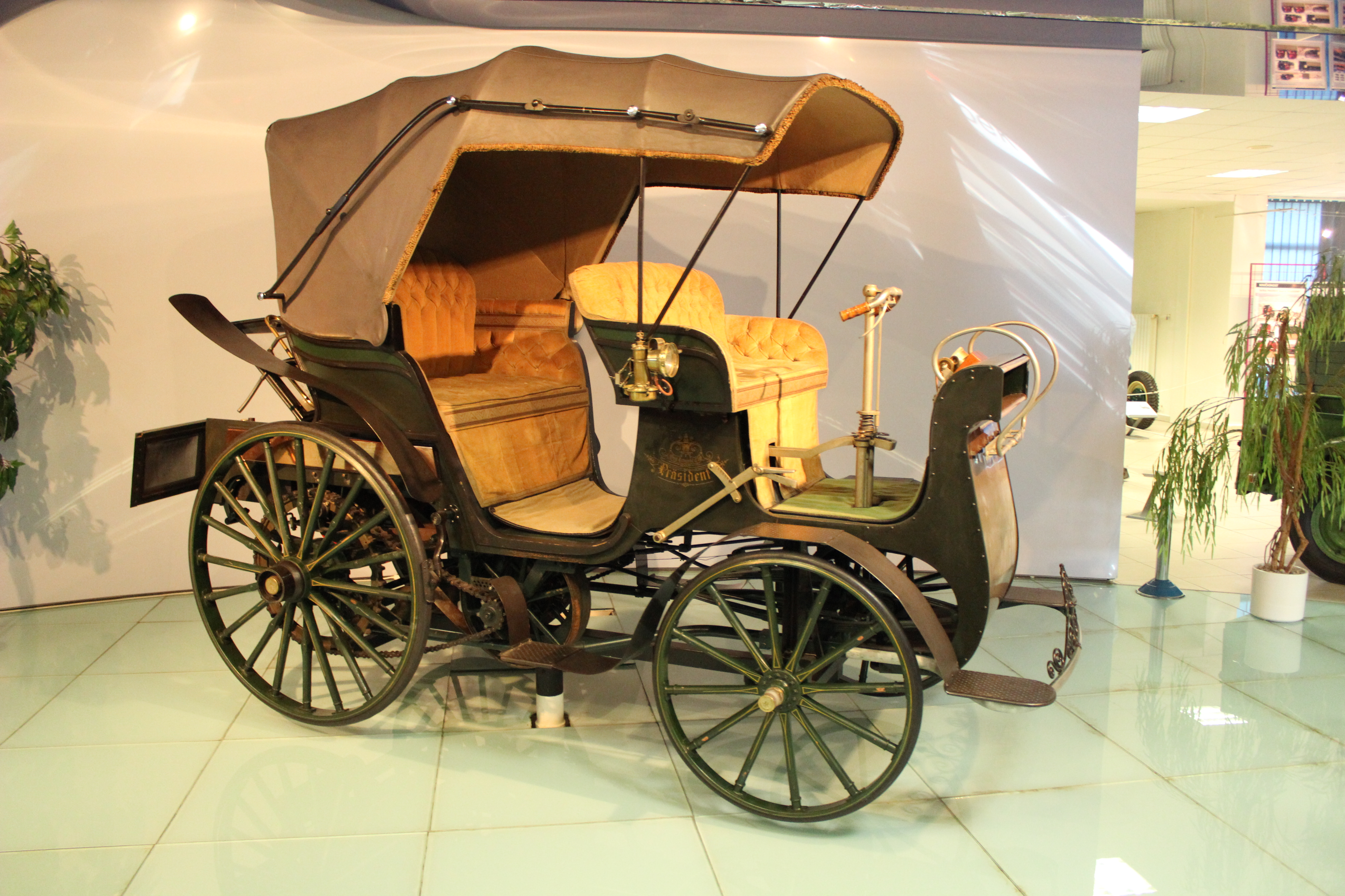 Exponát vystavený v Technickém muzeu Tatra, součásti Regionálního muzea v Kopřivnici. This image was acquired during the event Wikiměsto Kopřivnice.